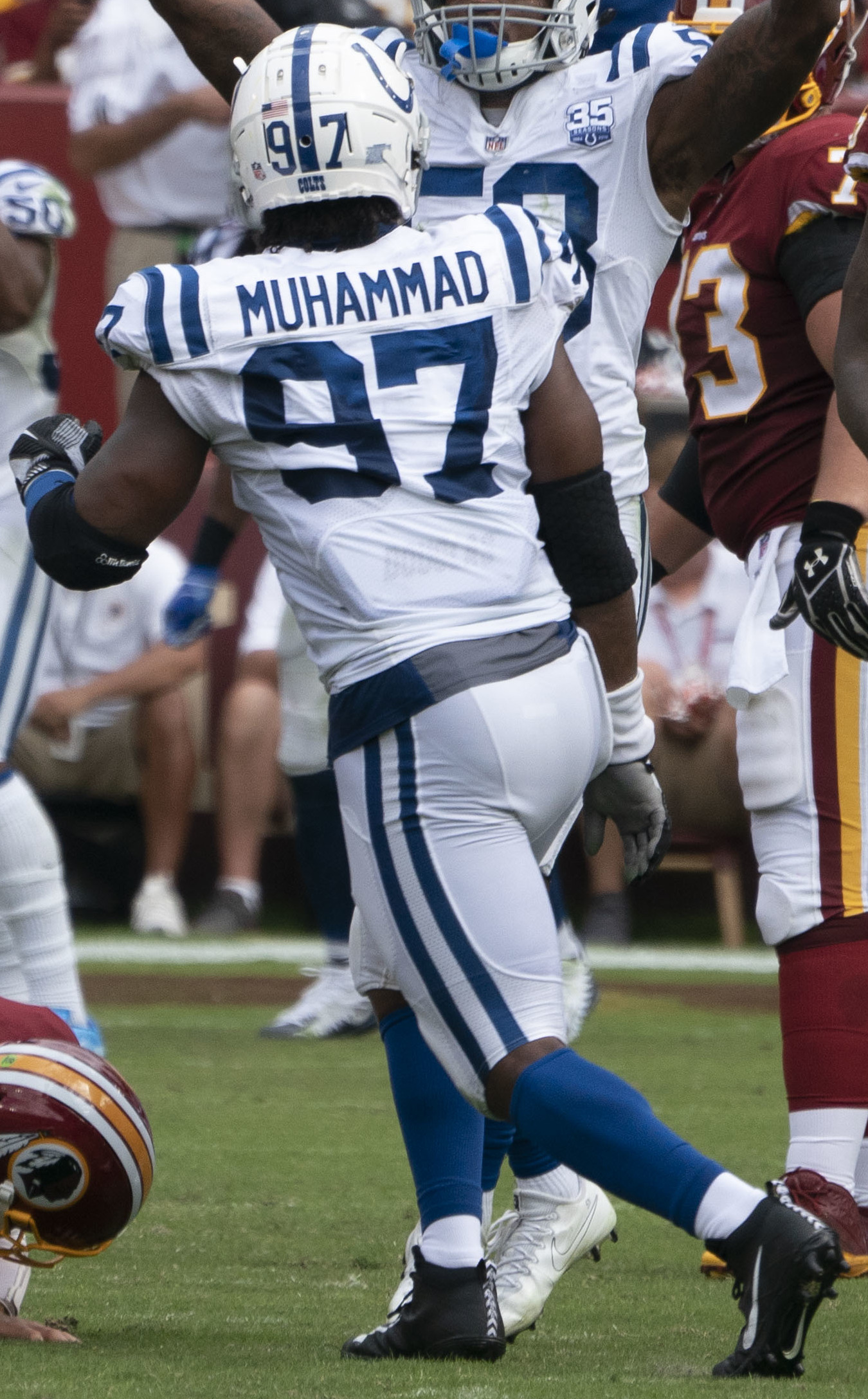 Colts at Redskins 09/16/18